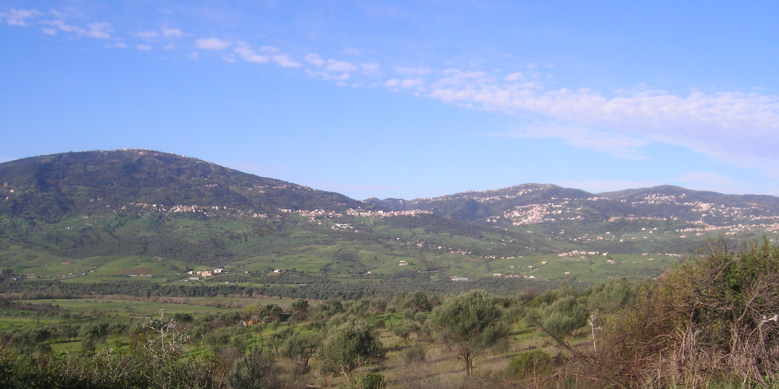 At-Bu-Cɛayeb et At-Xlili daira de Mekla